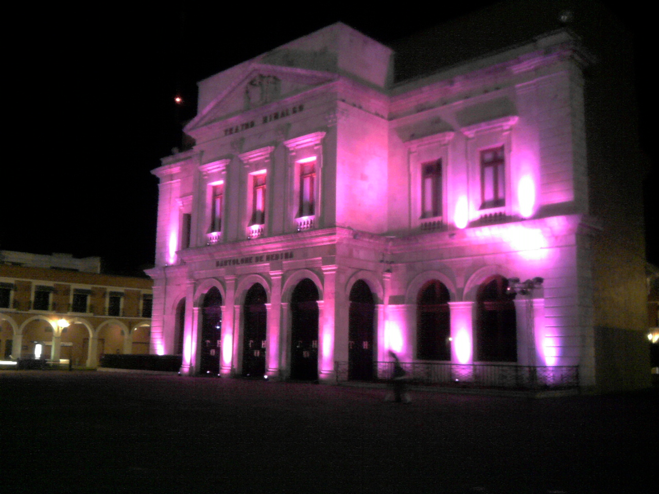 Teatro Hidalgo Bartolomé de Medina iluminado de color rosa el 21 de octubre de 2011 devido a una campaña contra el cancer de mama.